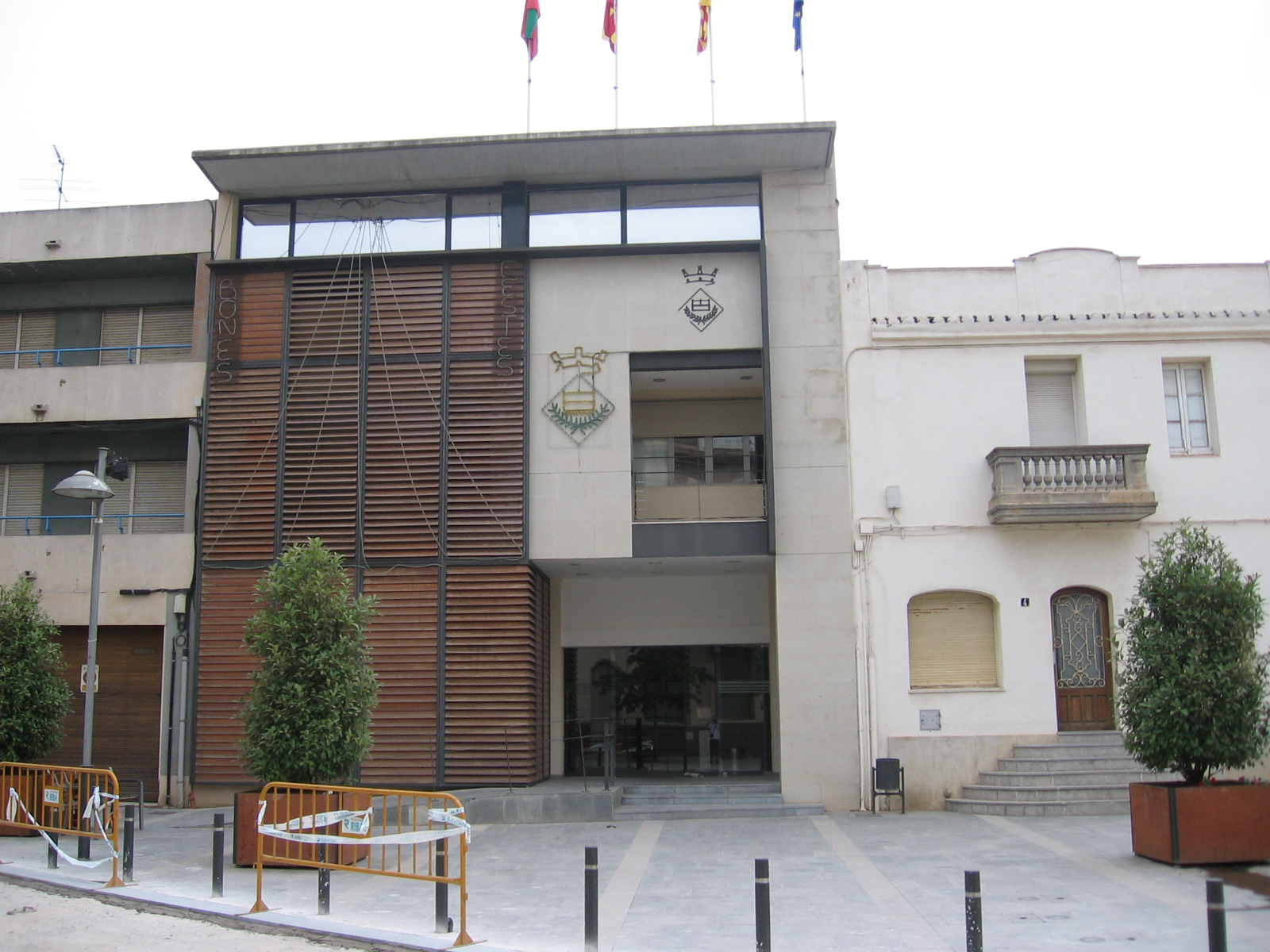 Ayuntamiento